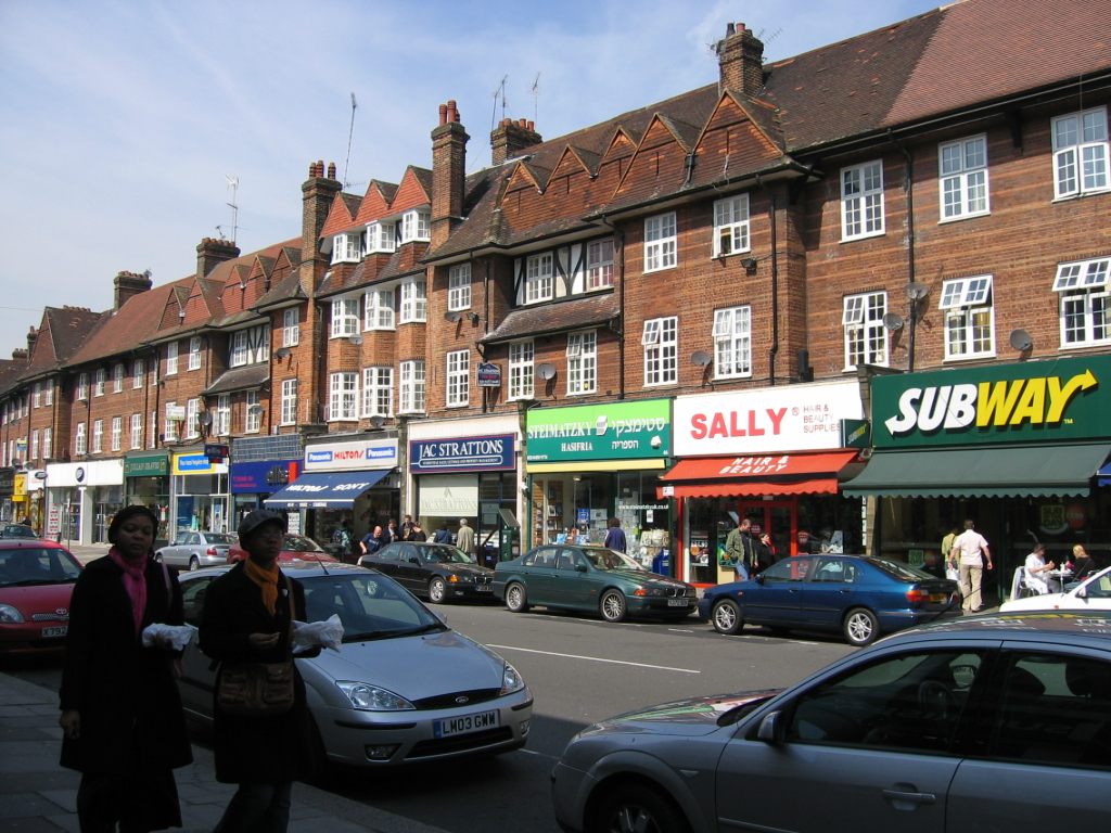 תמונה שרואים את גולדרס גרין, שכונה בלונדון. אני צילמתי, משוחרר לציבור לכל מטרה וללא תנאים Golders Green, London